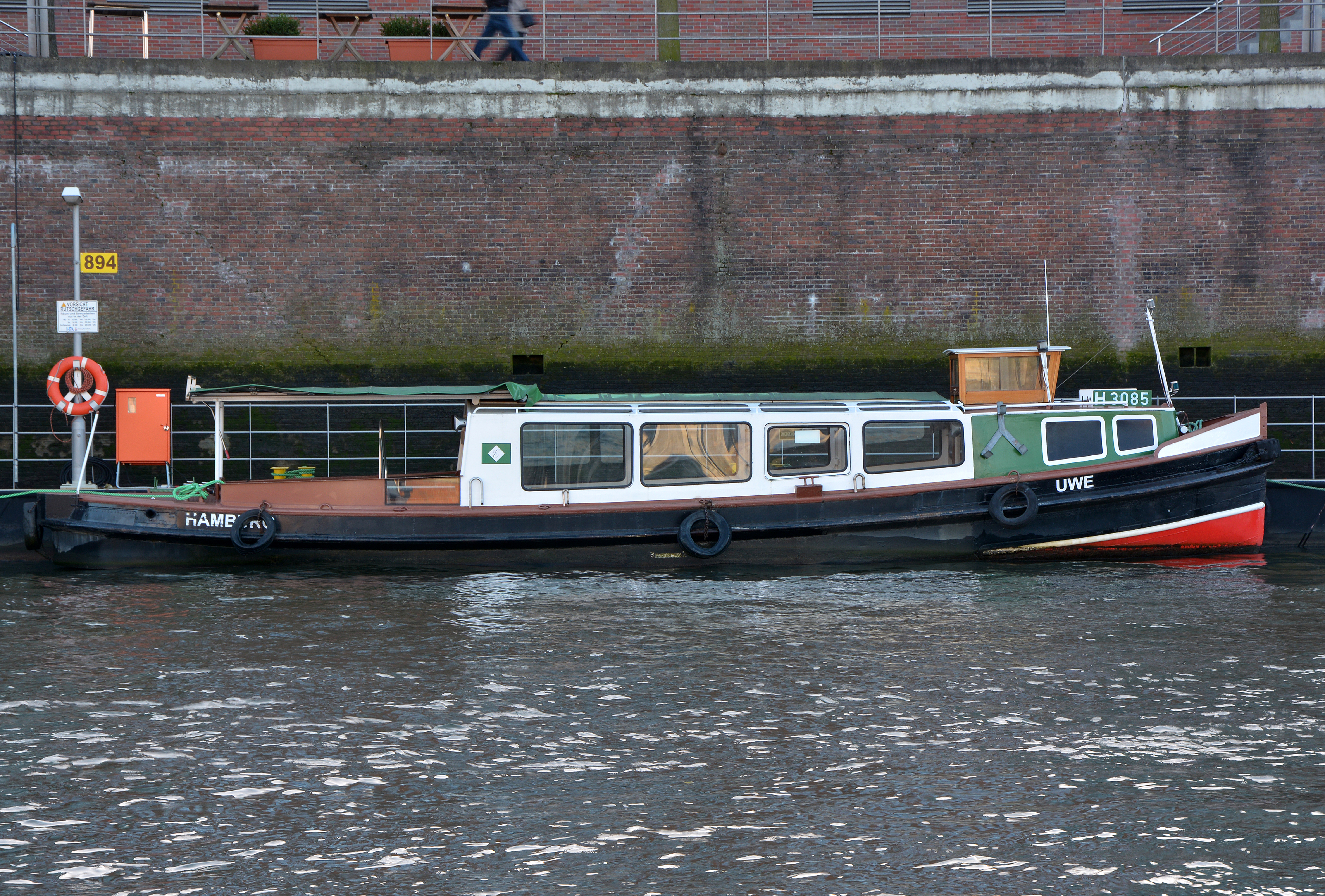 Die Barkasse Uwe (ex: Jaffa) im Hamburger Hafen Länge über alles: 15,08 m Breite über alles: 3,66 m Baujahr: 1914 Bauwerft: Schüler Werft am Moorregerdeich in Uetersen Antrieb: IVECO Motiorleistung: 85 kW Plätze: Innen 35 Pers.